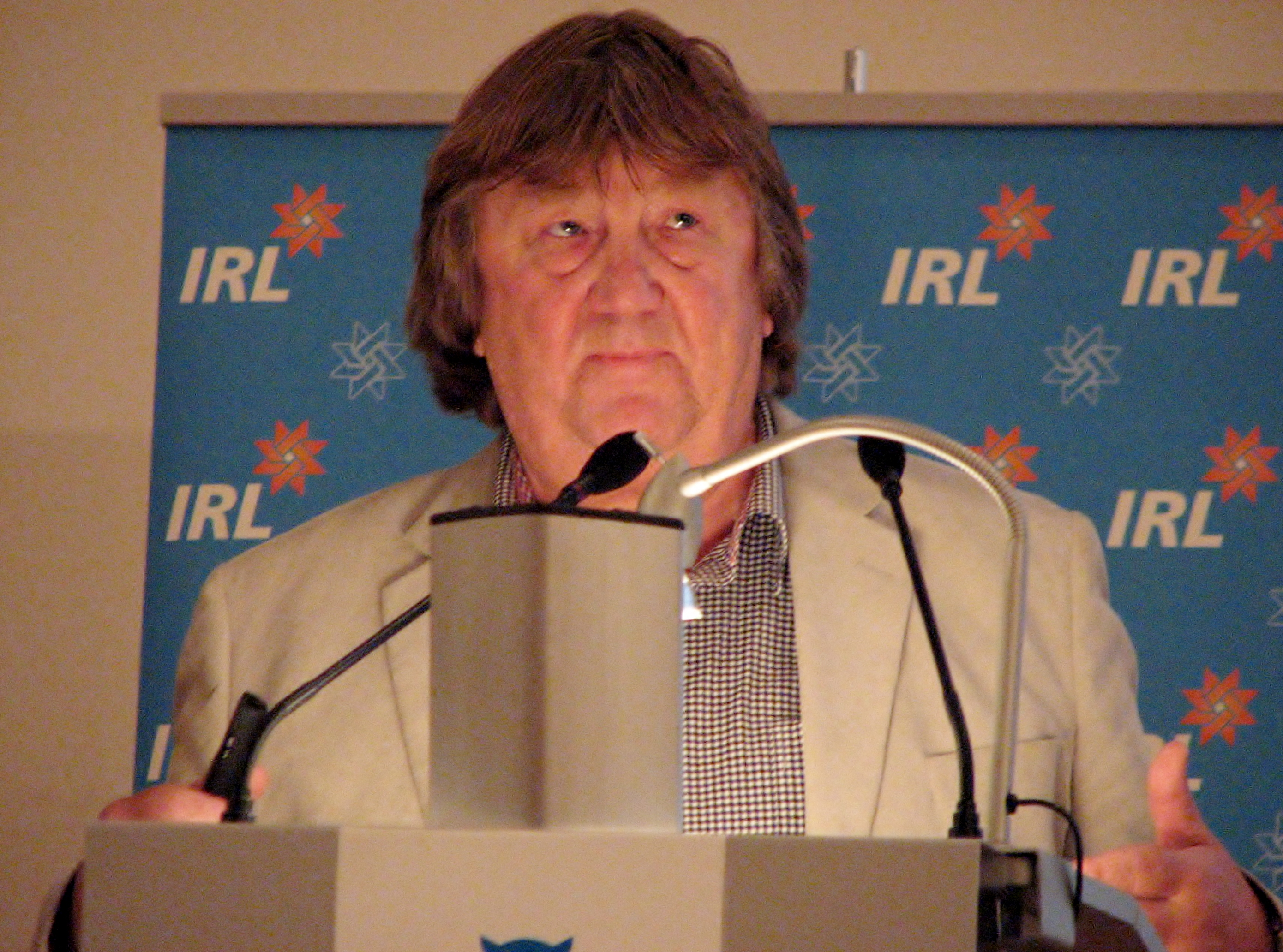 Kalle Küttis esinemas IRL-i hariduskonverentsil